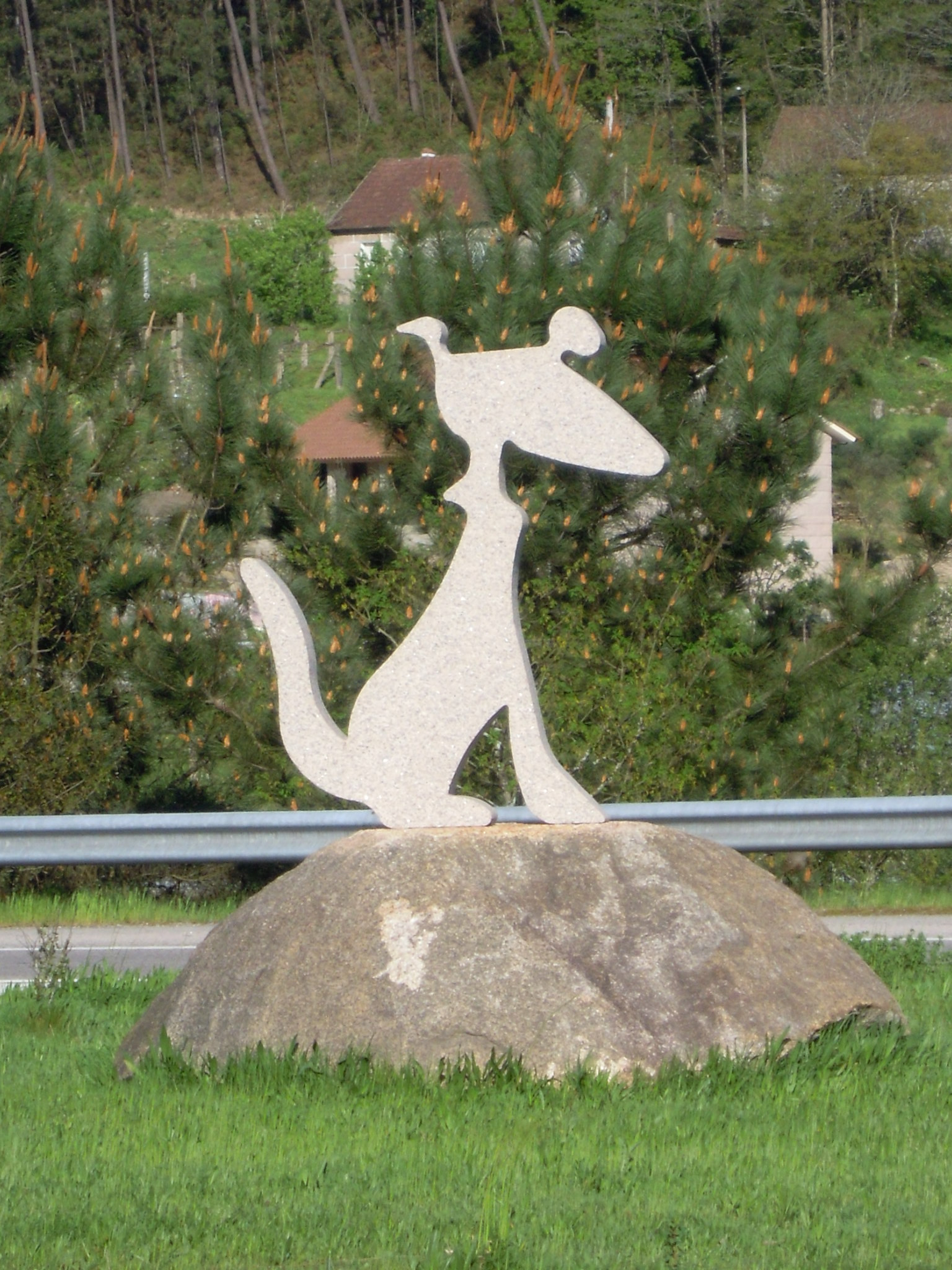 Sculpture du logo du "Festival de Cans", festival de cinéma dans la paroisse de Cans (commune O Porriño en Galice - EspagneGalego: Escultura do logotipo do Festival de Cans, na parroquia de Cans (O Porriño)